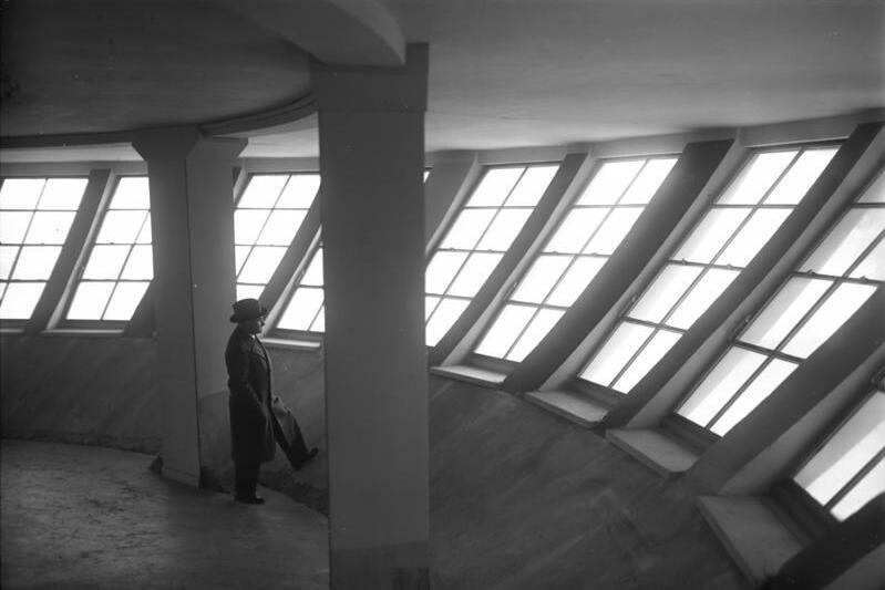 Das erste deutsche Kugelhaus wird vollständig renoviert! Das erste deutsche Kugelhaus, das einzige der Welt, ist anläßlich der Hygiene-Ausstellung in Dresden einer vollständigen Renovierung unterzogen worden. Blick in einen Raum des Kugelhauses mit der eigenartigen Fenster-Anlage.